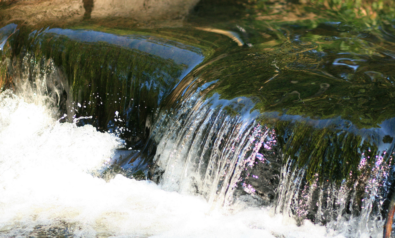 Sandvedparken